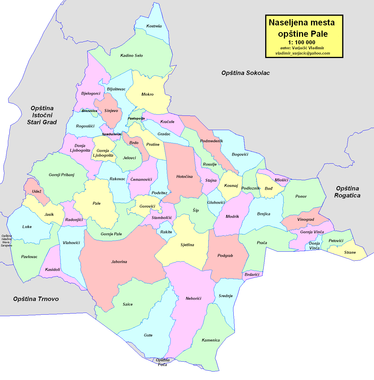 Opština Pale